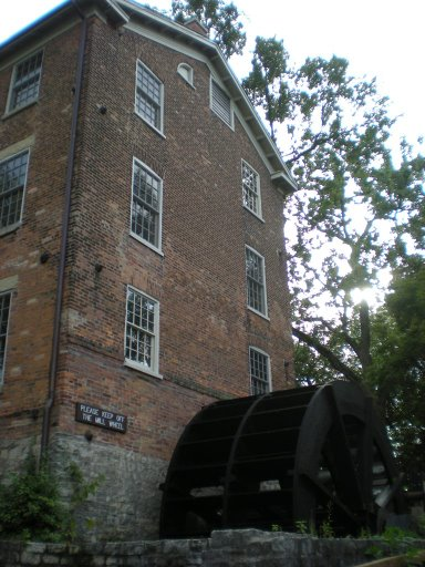 Graue Mill, Oak Brook, Illinois.